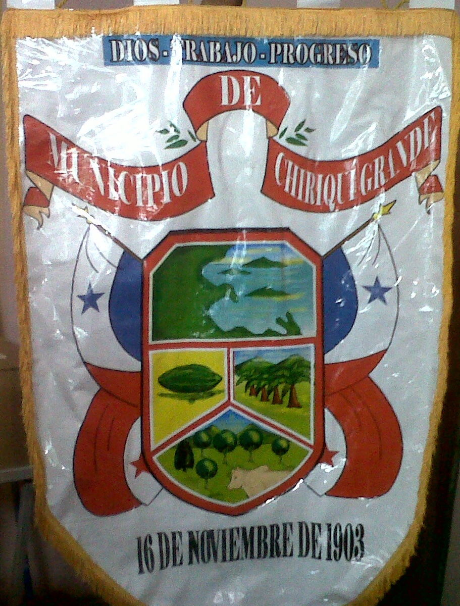 Estandarte del Distrito de Chiriquí Grande, Bocas del Toro